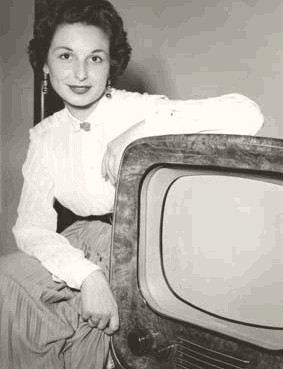 Nicoletta Orsomando a metà degli anni 1950, al debutto come una delle prime Signorine buonasera della RAI